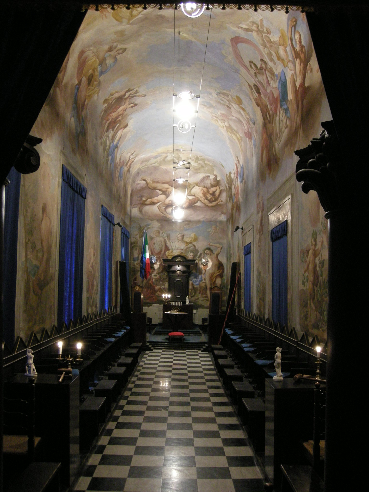 Palazzo Roffia, galleria